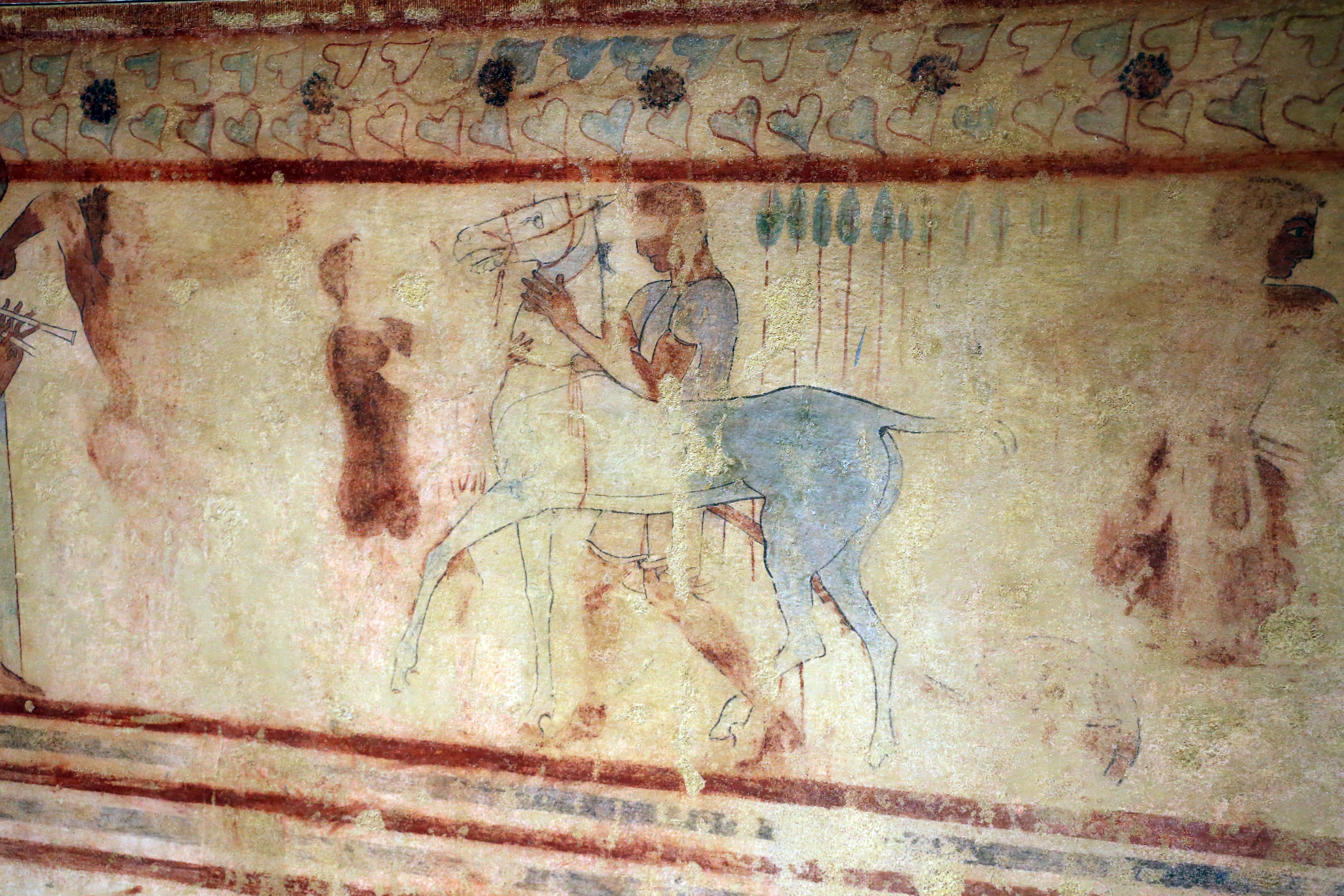 Villa Giulia (Rome) This is a photo of a monument which is part of cultural heritage of Italy.